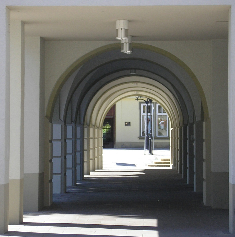 Die Arkaden an der Sparkasse in Ilmenau (Thüringen).